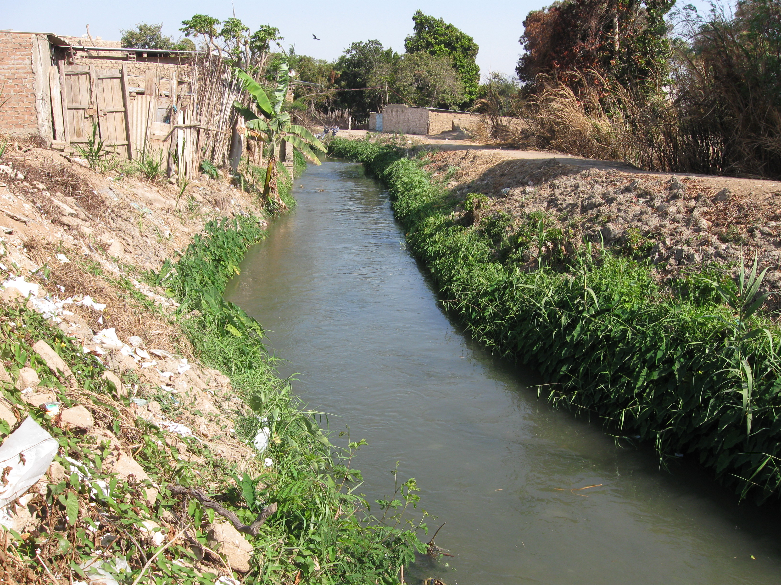 Asequia sanjose pacasmayo